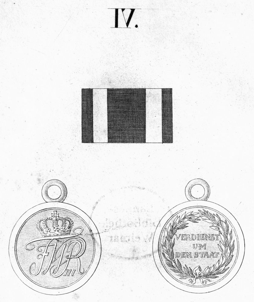 Das preußische Militär-Ehrenzeichen Die kleine goldene Medaille hatte nach Hessenthal und Schreiber einen Durchmesser von 30 mm